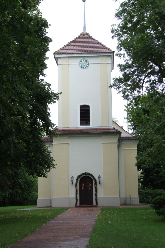 Dorfkirche in Berlin-Lübars Fotograf: Harald Rossa Datum: August 2006 Höher aufgelöste Version ist verfügbar